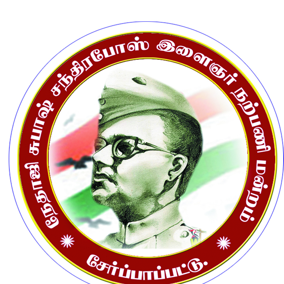 நேதாஜி சுபாஷ் சந்திர போஸ் இளைஞர் நற்பணி மன்றம், சேர்ப்பாப்பட்டு